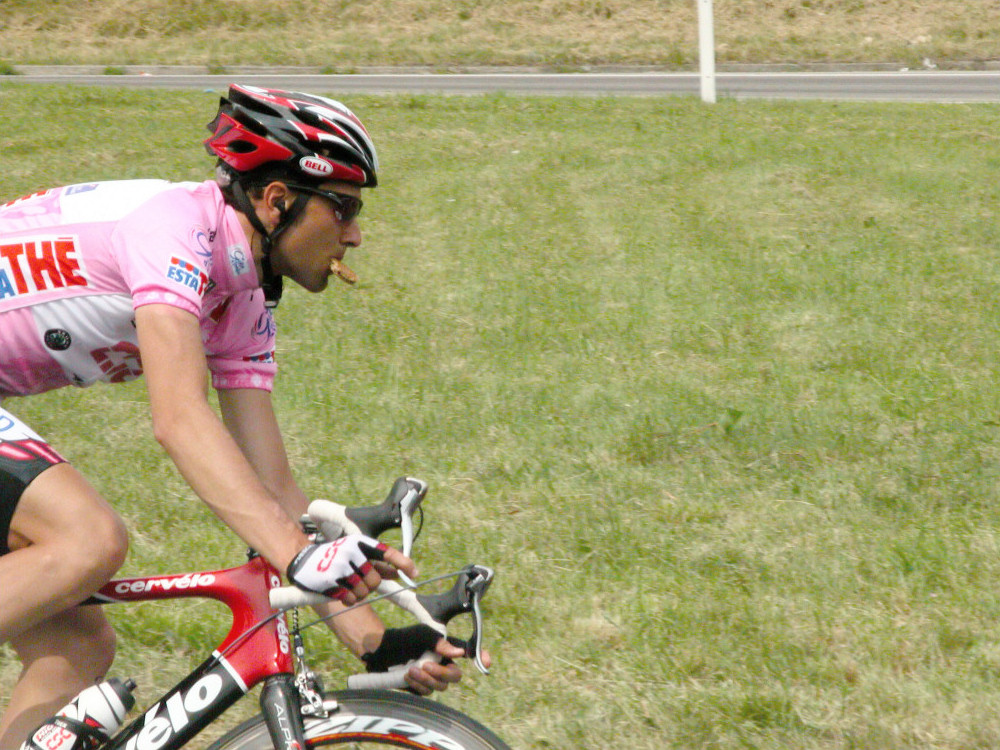 Soggetto: Ivan Basso, vincitore del Giro d'Italia 2006. Luogo: Vimercate Autore:Yoruno Fonte: scatto da me realizzato Licenza d'uso: CC-BY-SA-3.0